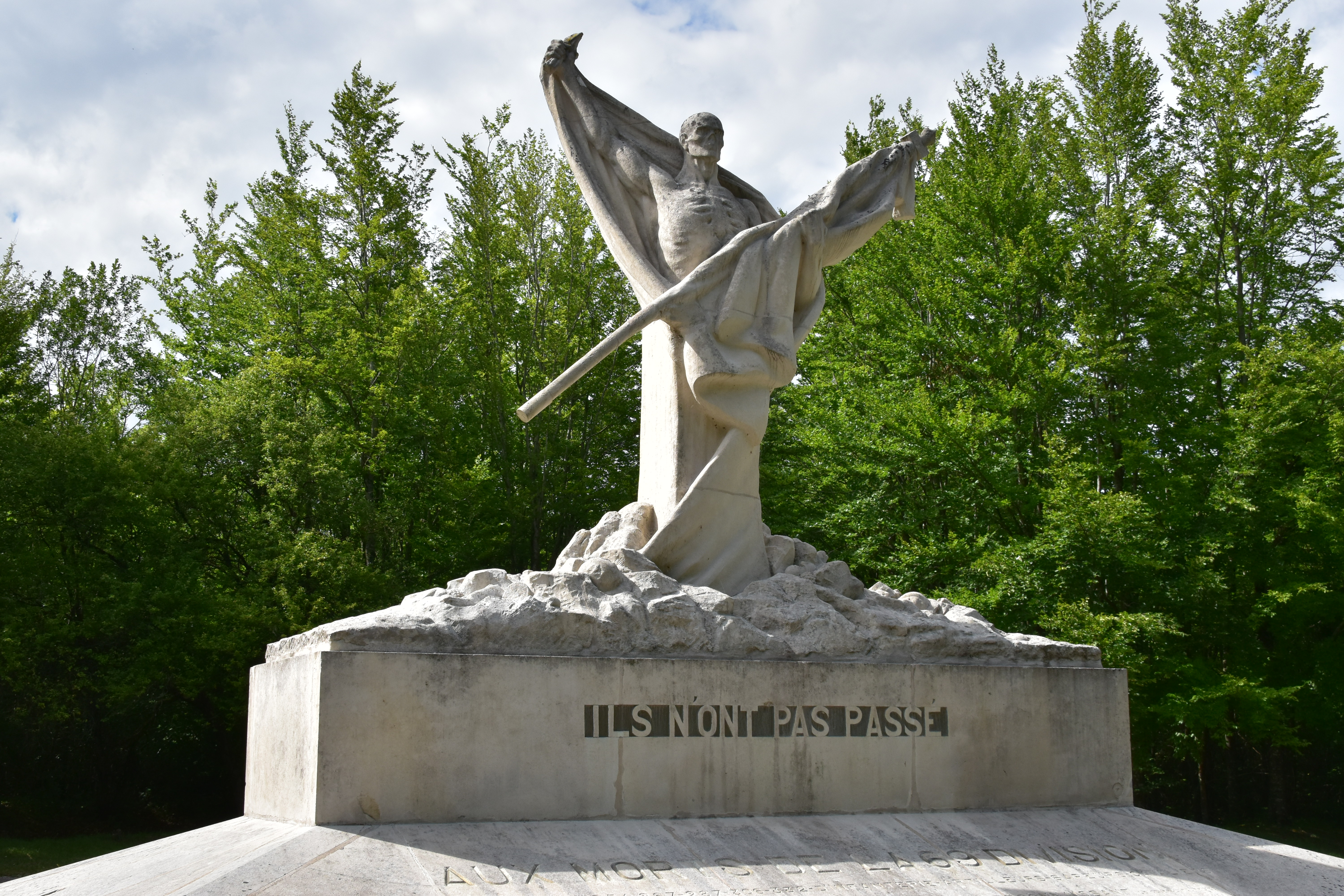 Le mémorial de Mort-Homme.